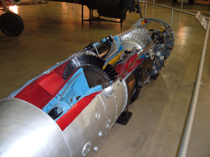 Schnittmodell im Air Force Museum Dayton, Ohio, USA. Blau: Verbrennungs- und Kühlluft; Rot: Brenn- und Abgase